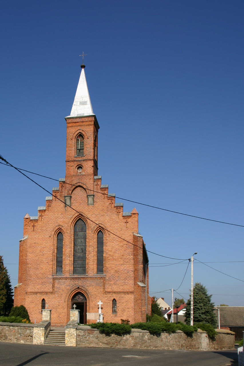 Wróblin - rzymskokatolicki kościół parafialny pw. św. Michała Archanioła, 1855.